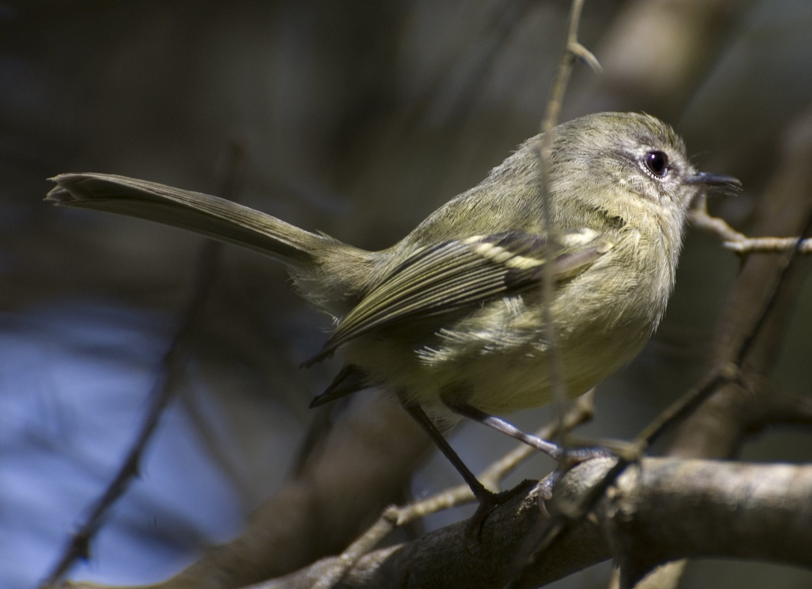 Phylloscartes ventralis LIGERITO. Fotografía tomada en Uruguay.